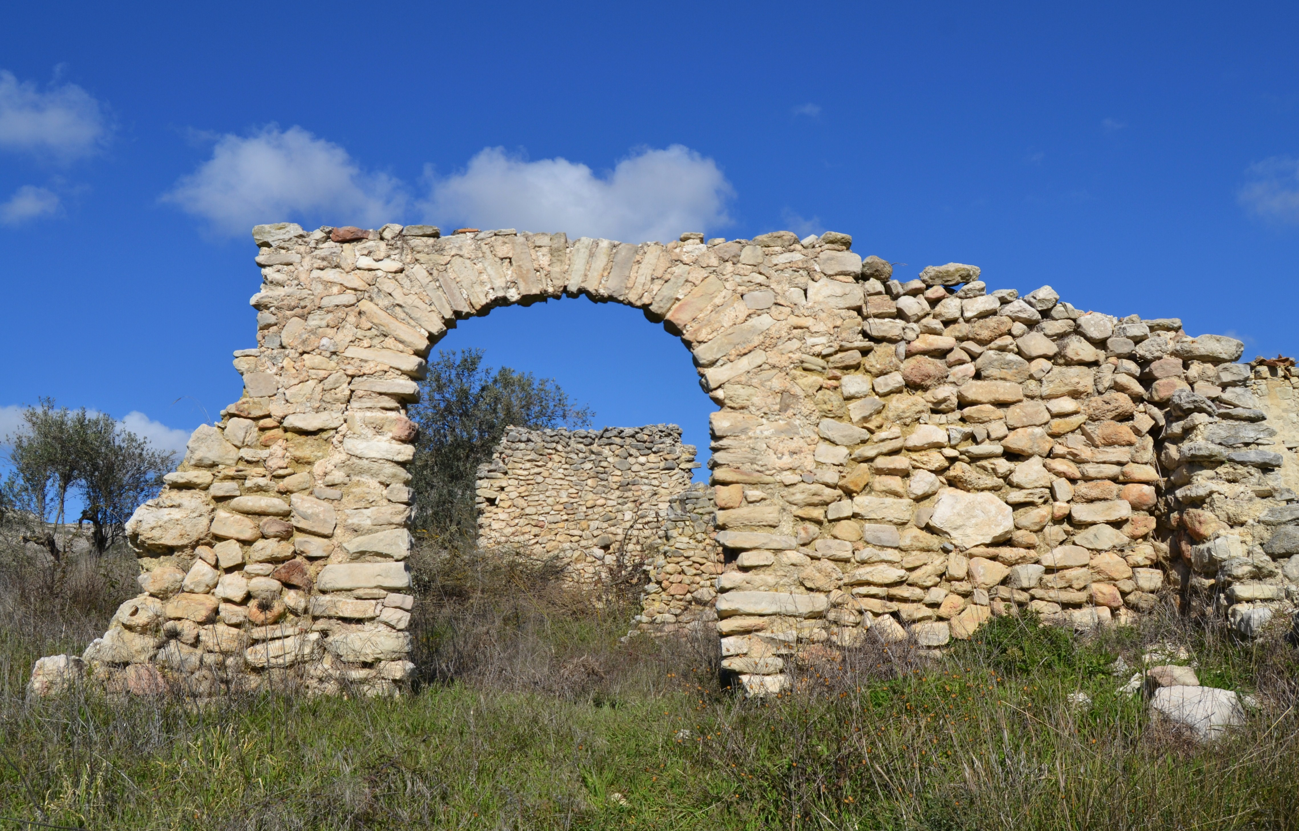 Despoblat morisc de la Roca, arc.